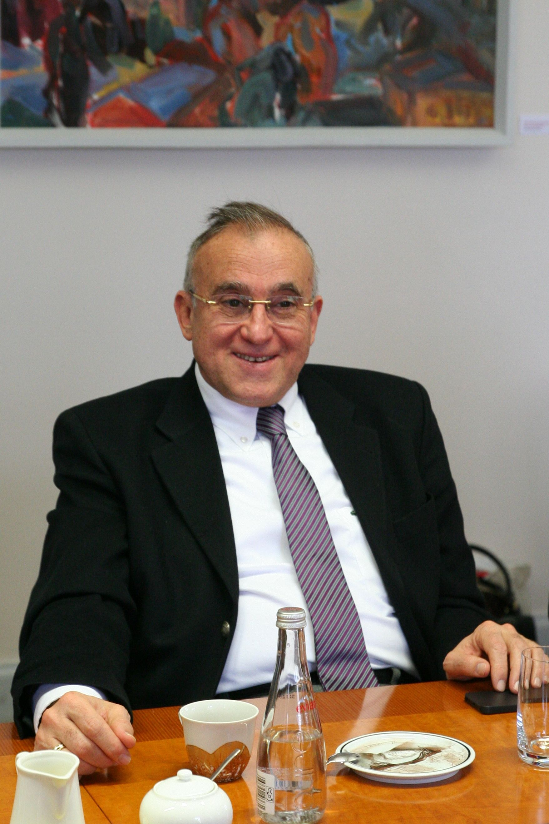 Gaziantepi linnapea Asim Güzelbey visiidil sõpruslinnas Tartus. Foto: Lilian Lukka.